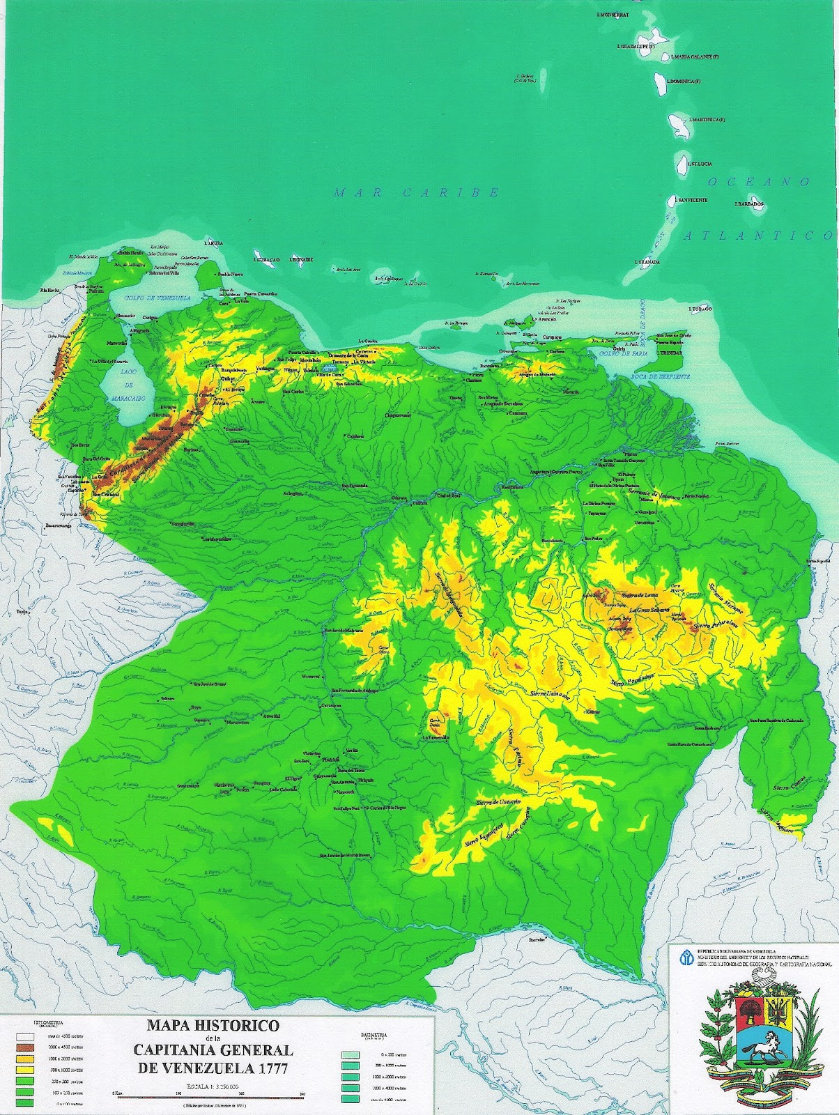 Mapa de la Capitania General de Venezuela elaborado por el Instituto Geografico de Venezuela en 1995.